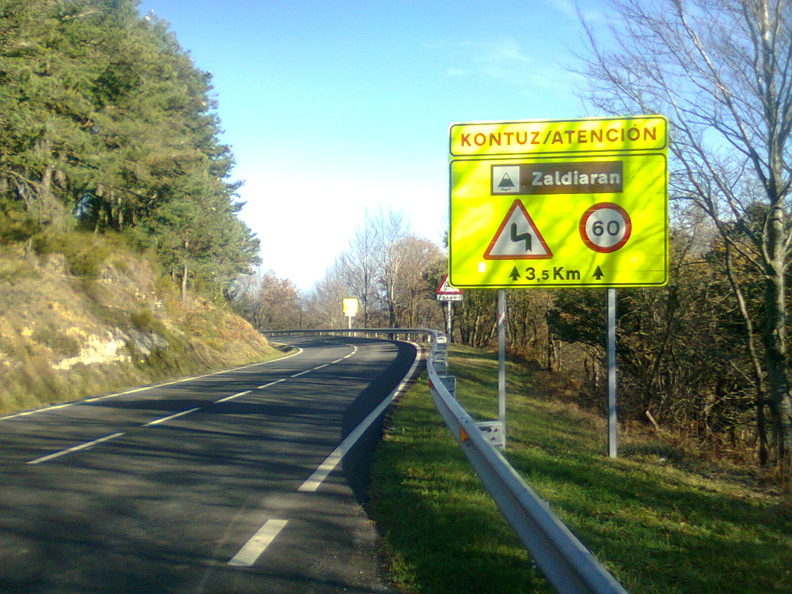 Cima del puerto de Zaldiaran